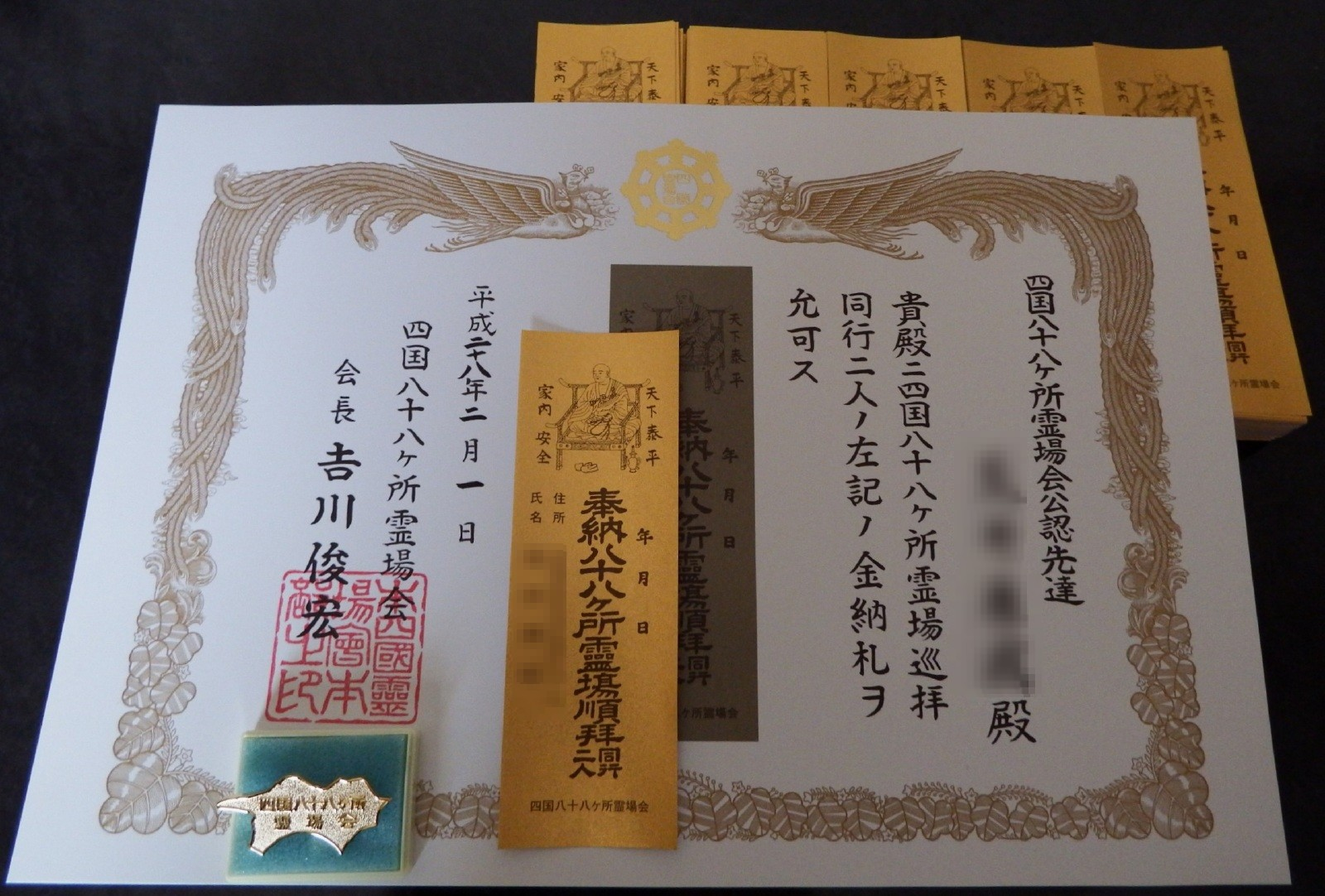 四国霊場会より５０回結願したら申請により拝命されます。